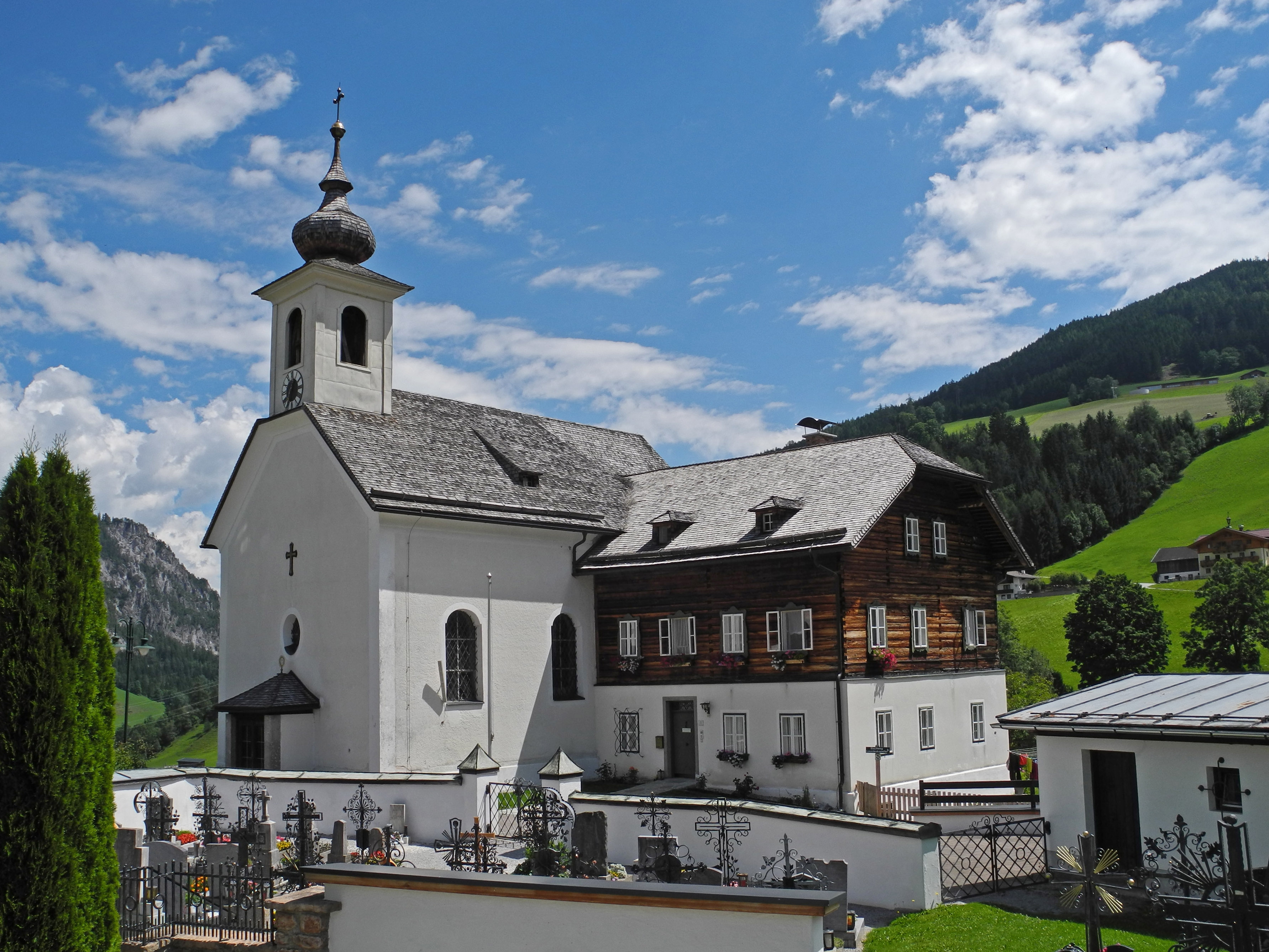 Pfarrkirche des hl. Leonhard und Pfarrhof in Forstau